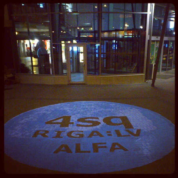 Simboliskais 4sq cling pie TP Alfa ieejas, par godu foursquare dienai 16/04